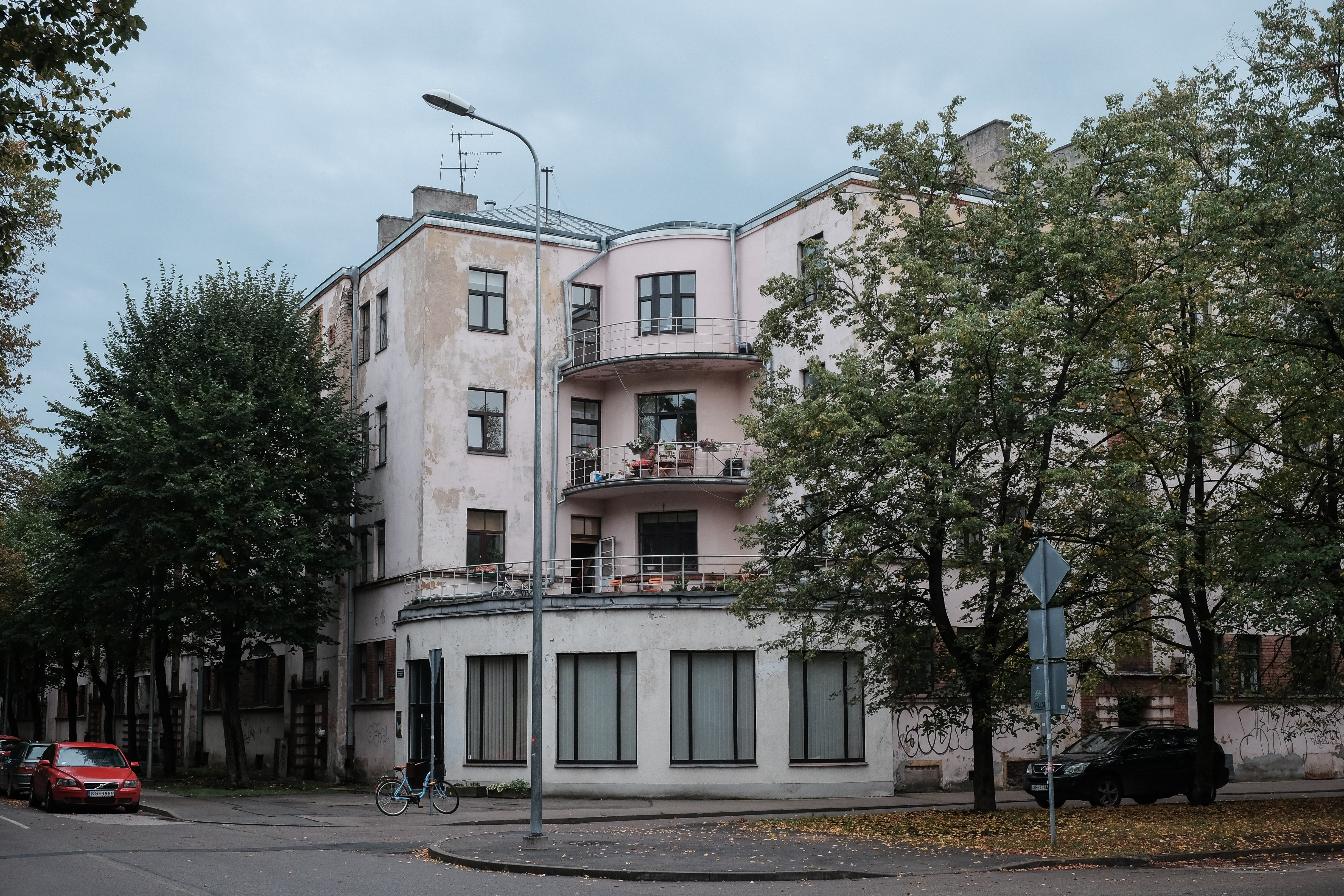 Dzīvojamā ēka, Rīga, Jāņa Asara iela 15